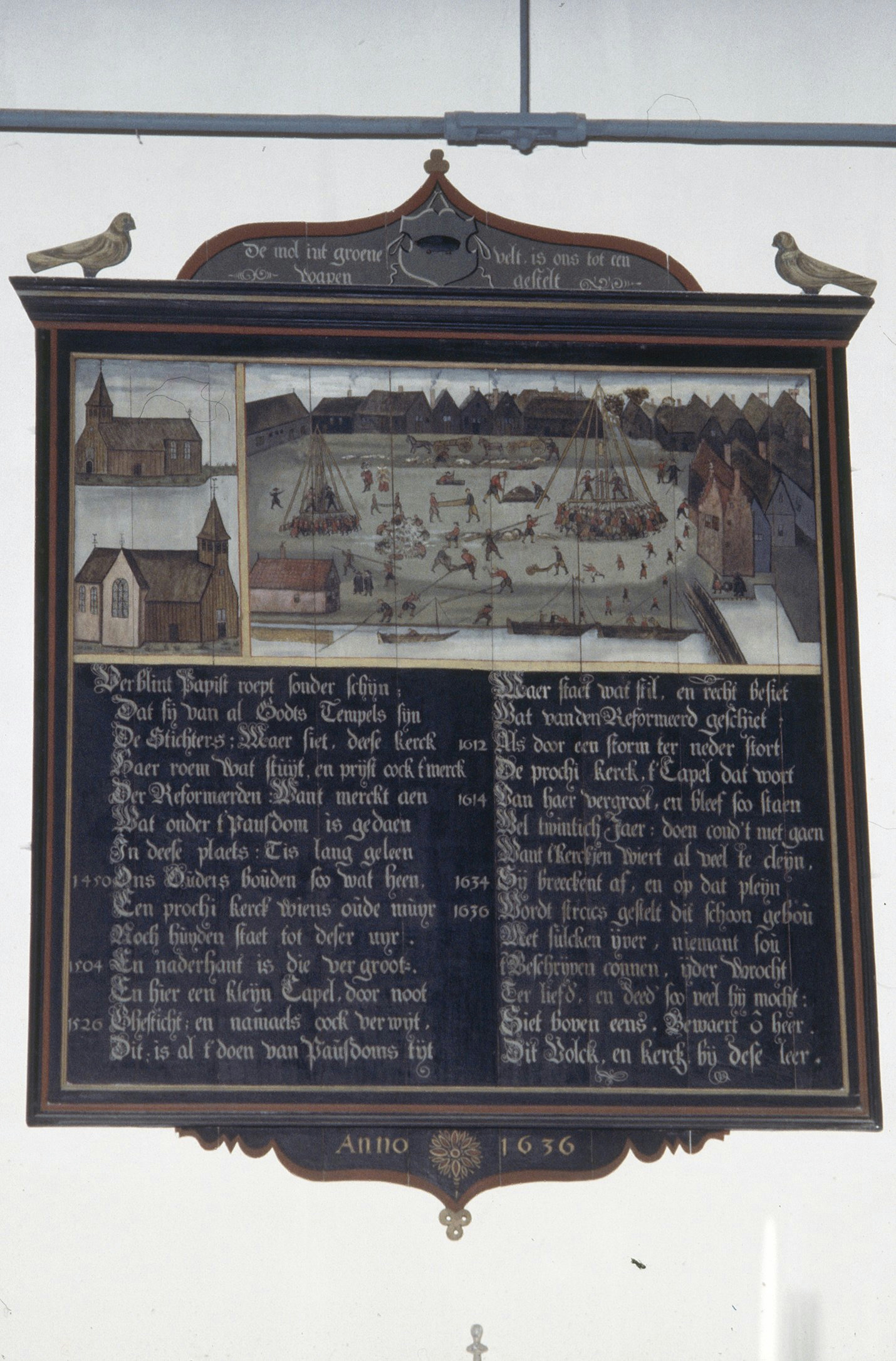 Nederlands Hervormde Kerk: INTERIEUR, TEKSTBORD